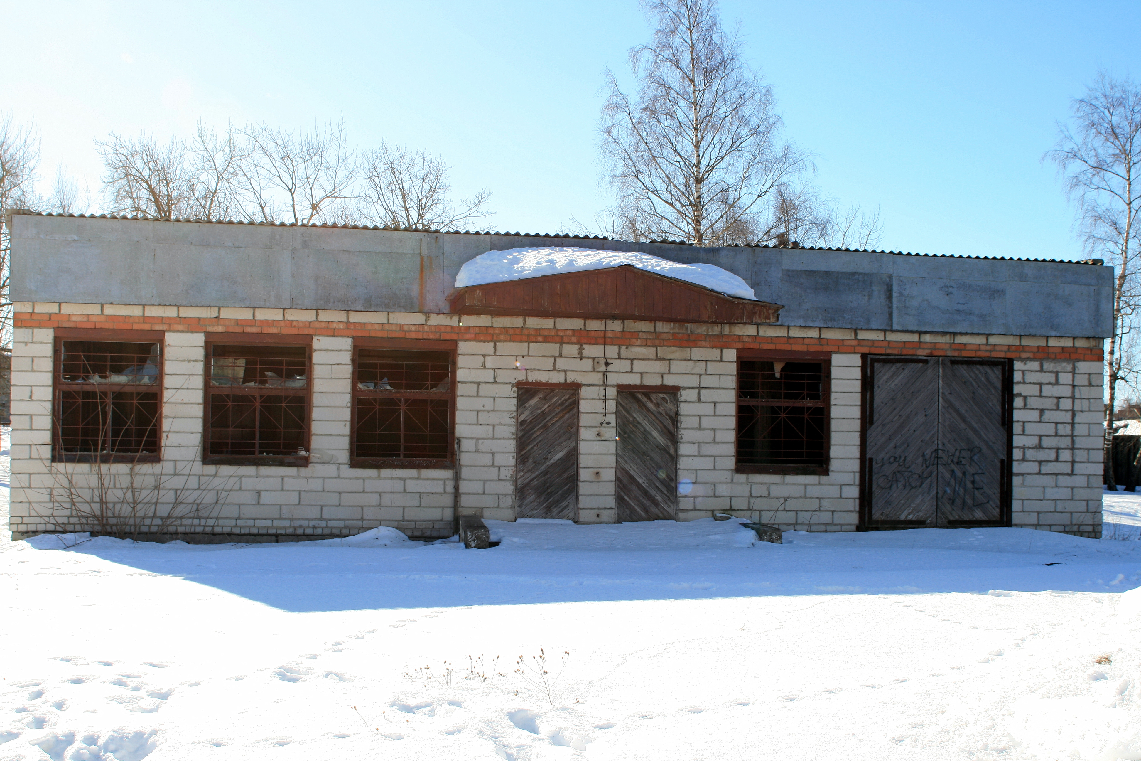 Endine Pihtls tee sõjaväeosa kauplus Kuressaares Kaare tänaval